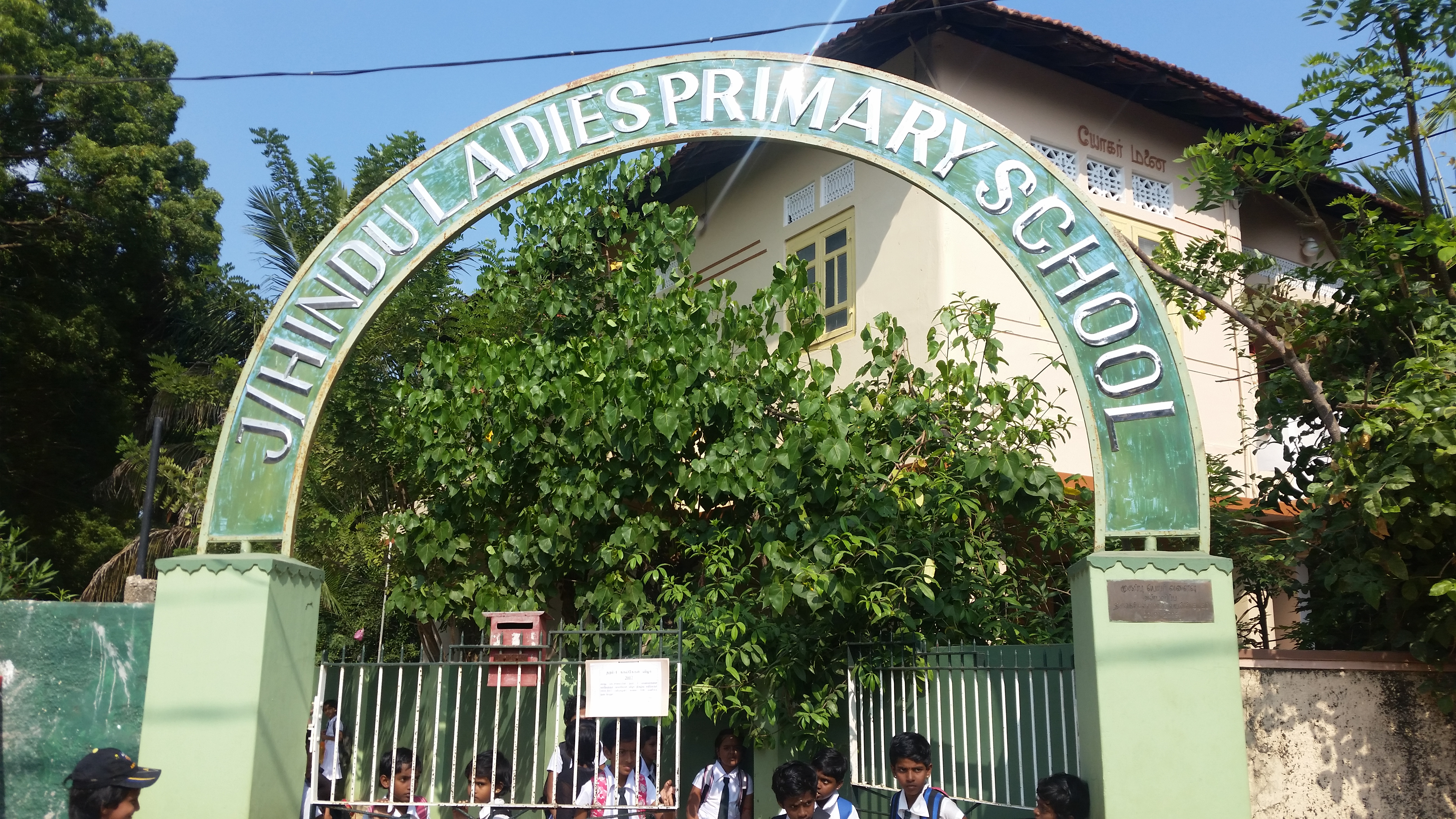 இந்து மகளிர் ஆரம்பப் பாடசாலையின் நுழைவாயில்